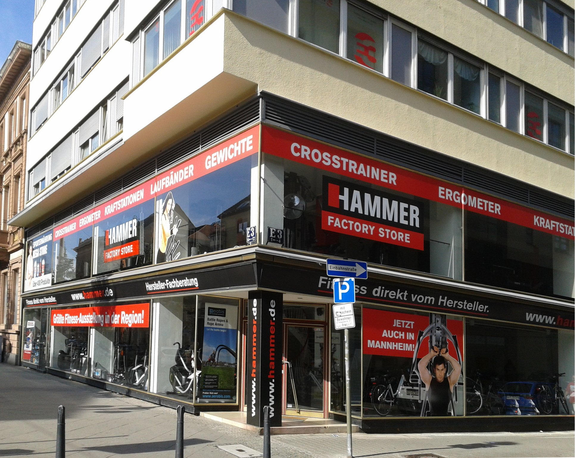 Hammer Factory Store in Mannheim, E3